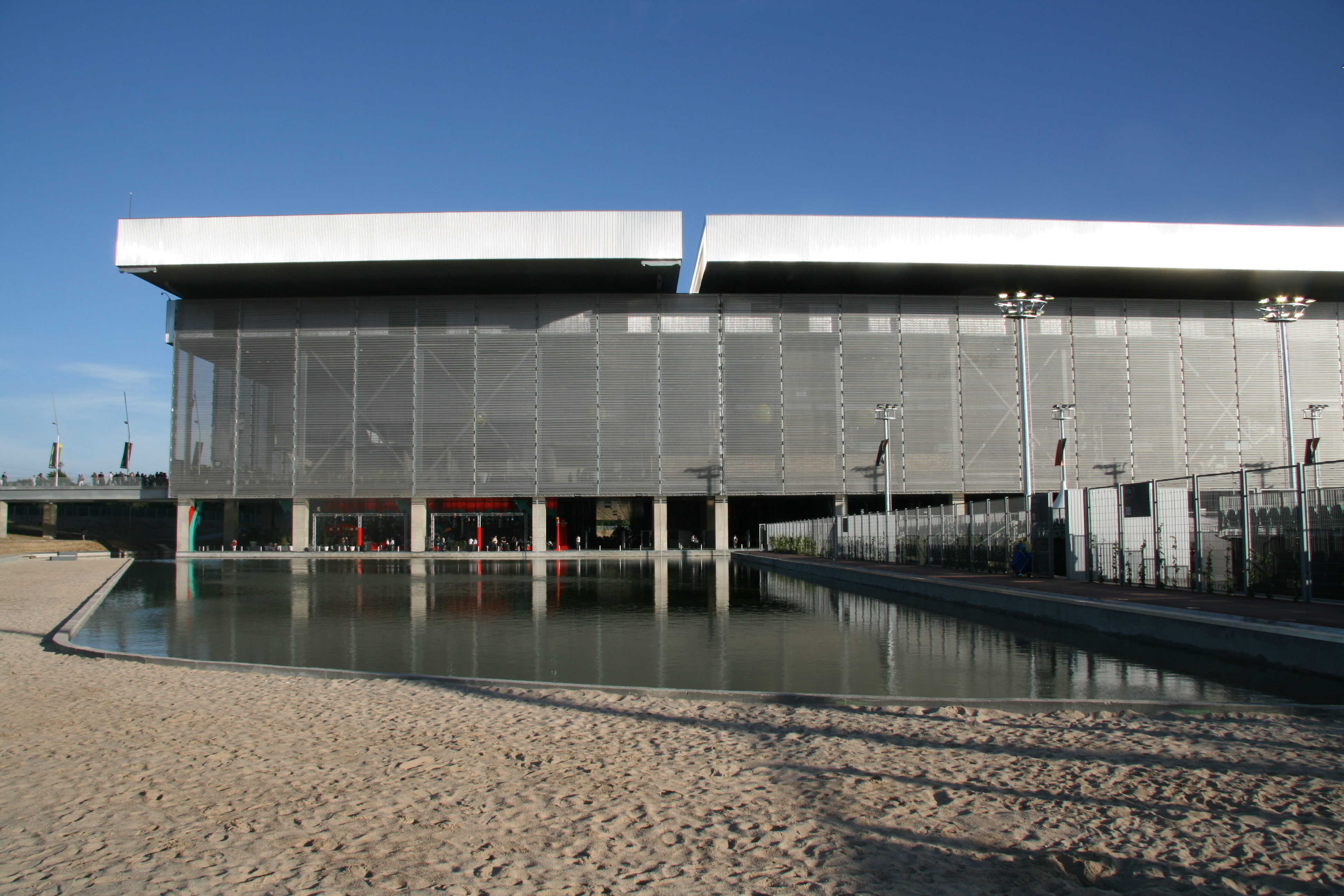 Exterior de la Caja Mágica de Madrid.